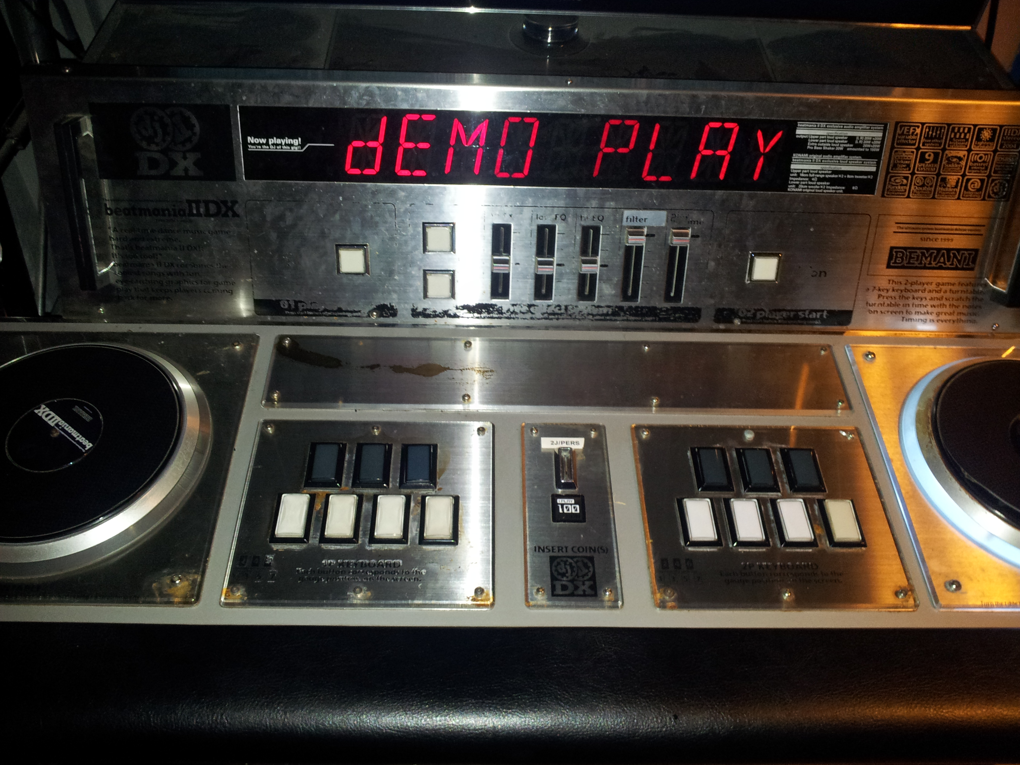 Les boutons et le vinyle de chaque joueur ainsi que les boutons FX